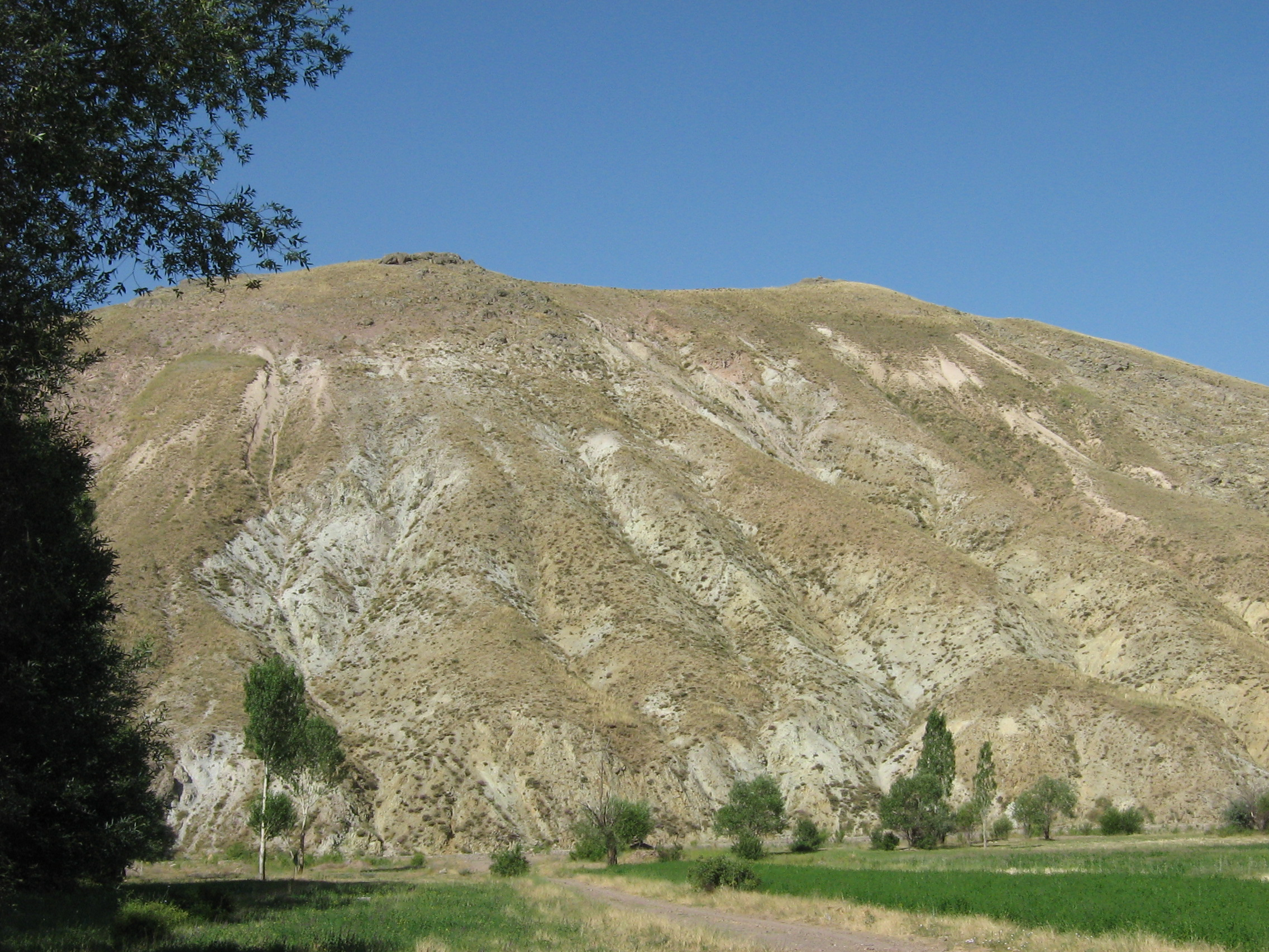 قایش قورشاق